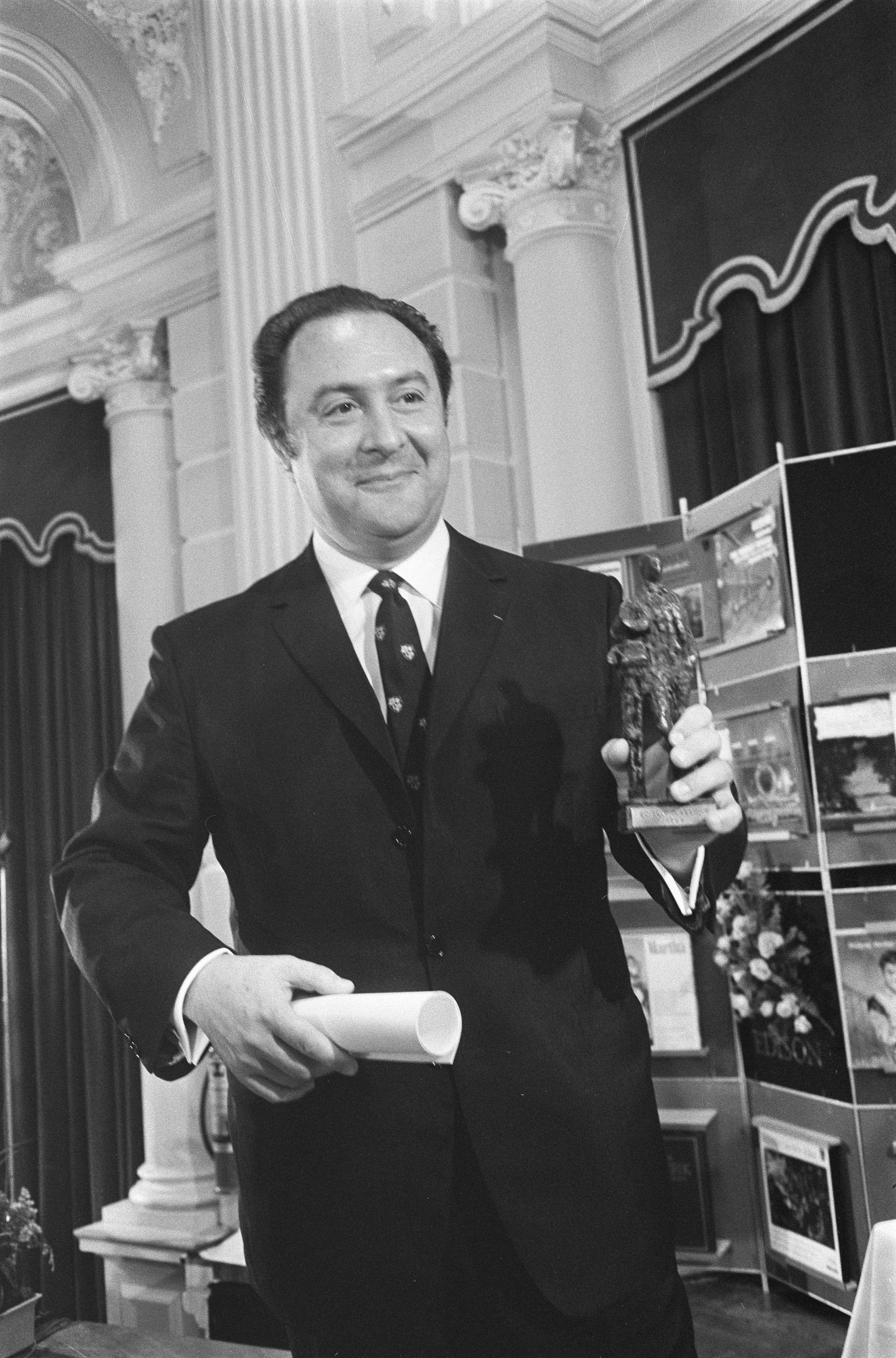 Collectie / Archief : Fotocollectie Anefo Reportage / Serie : [ onbekend ] Beschrijving : Klassieke Edisons 1969 worden uitgereikt in het Concertgebouw Amsterdam. 20.20a.21a. Jean Pierre Rampal , 22a Edith Mathis (sopraan) Datum : 3 oktober 1969 Locatie : Amsterdam, Noord-Holland Trefwoorden : CONCERTGEBOUWEN Persoonsnaam : Edith Mathis, Jean Pierre Rampal Fotograaf : Koch, Eric / Anefo Auteursrechthebbende : Nationaal Archief Materiaalsoort : Negatief (zwart/wit) Nummer archiefinventaris : bekijk toegang 2.24.01.05 Bestanddeelnummer : 922-8385